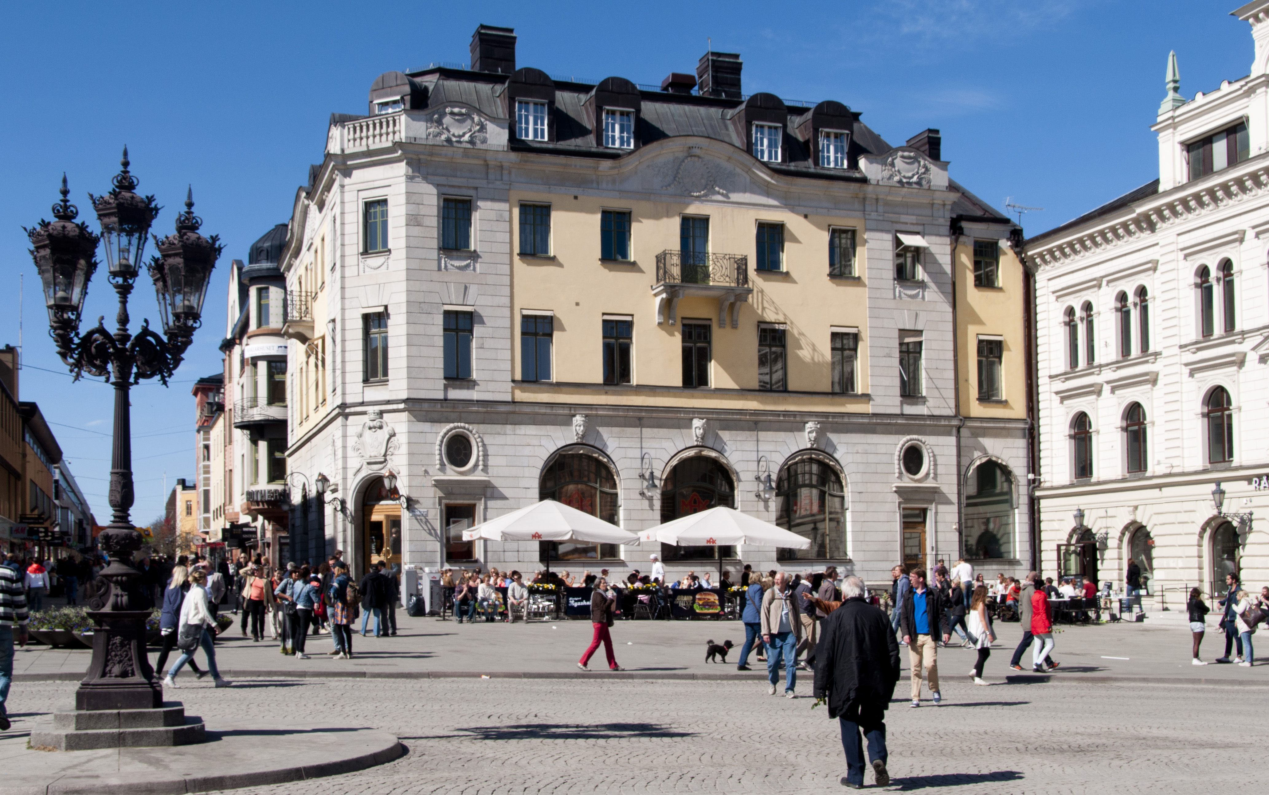 Mälareprovinsernas enskilda bank, Stora Torget 6, Uppsala. Byggnadsår 1902-03. Arkitekt: Ullrich & Hallquisth